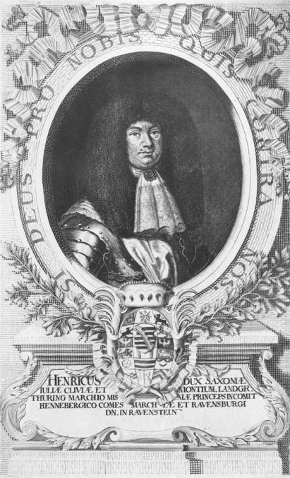 Heinrich, Herzog von Sachsen-Römhild; Titel/Zielname des Bildes fälschlicherweise "Heinrich von Sachsen-Weißenfels-Barby"